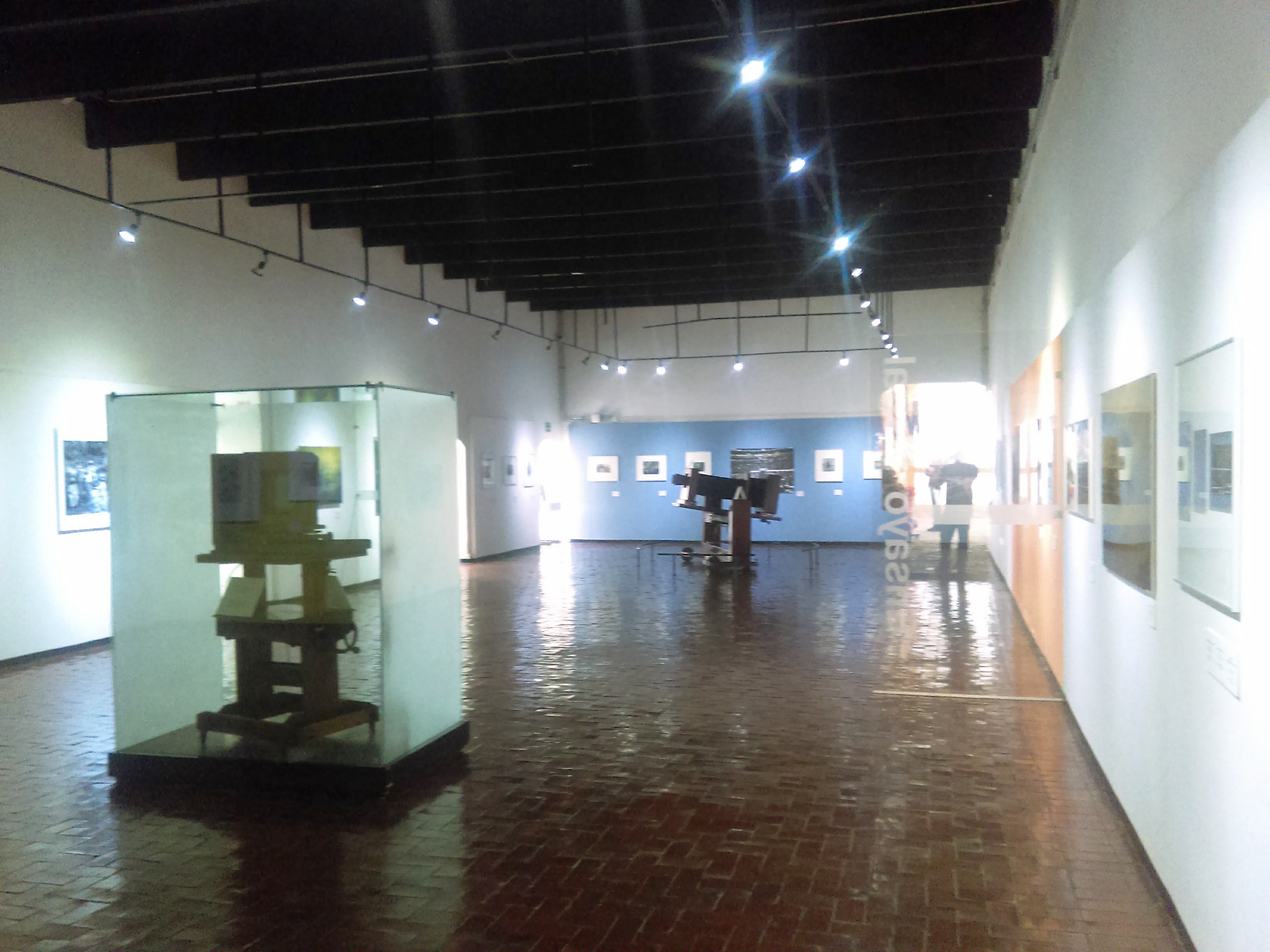 Museo Nacional de la Fotografía (México).